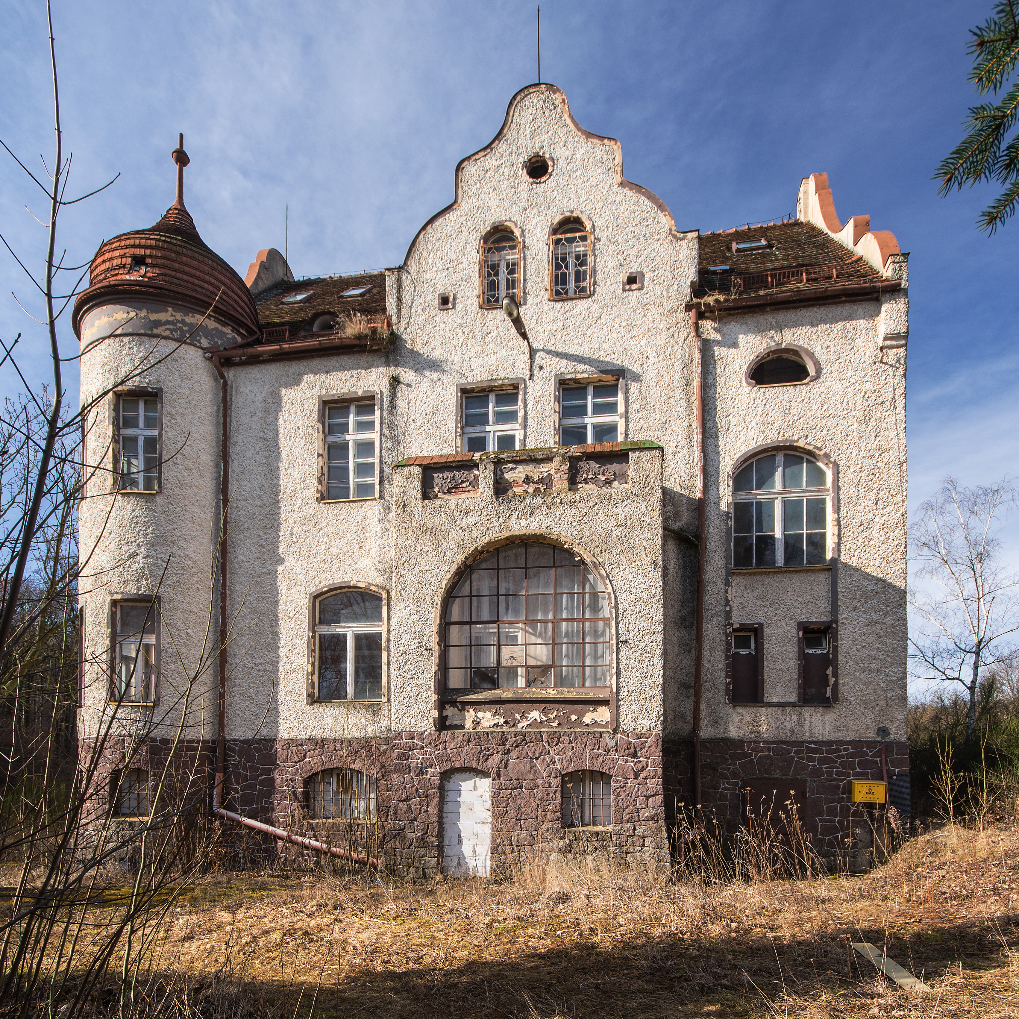 Jaskulin 13, pałac, ob. DPS, XVIII, XX (brak w wykazie WUOZ) Wikidata has entry 597388 with data related to this item.